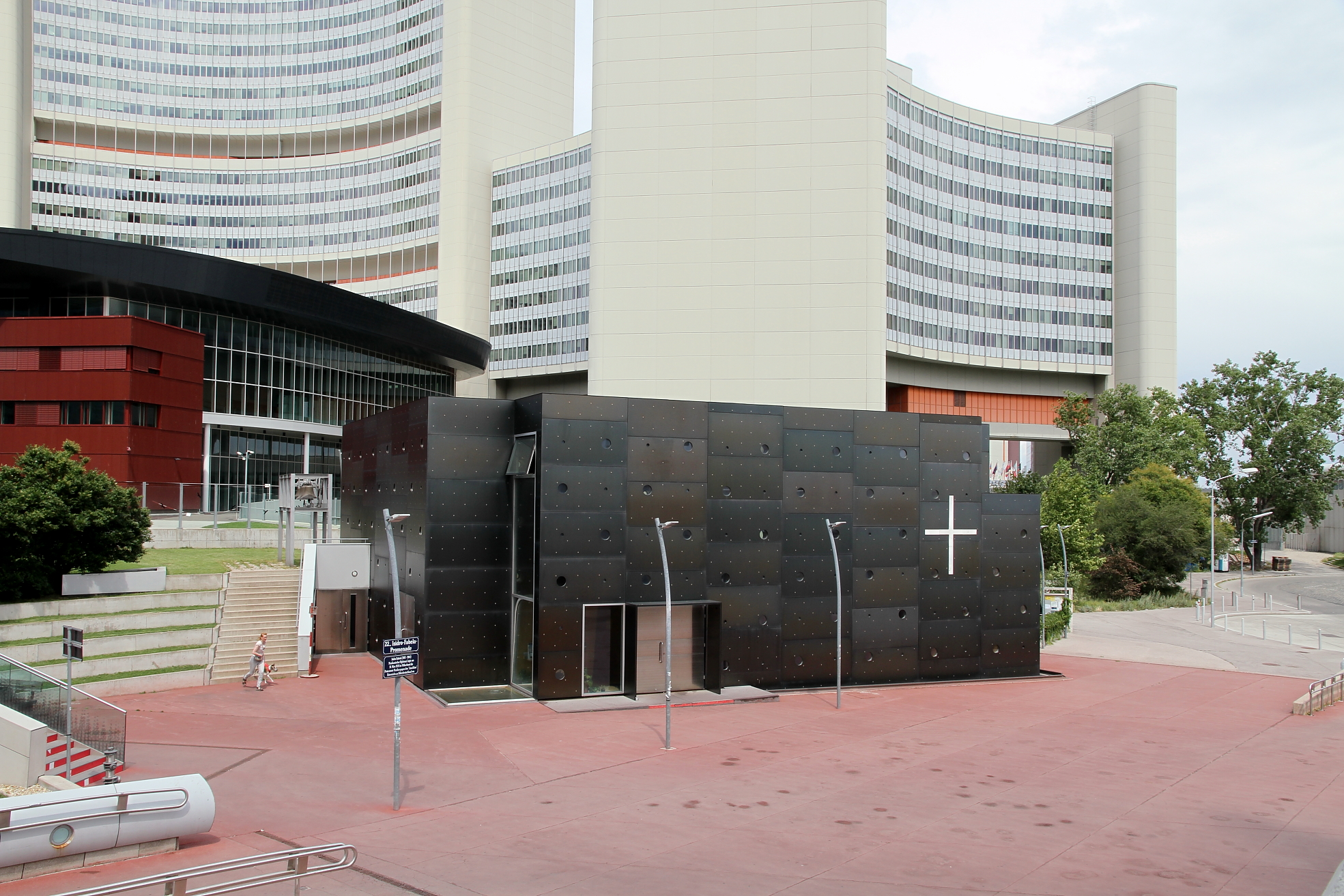 Die nach den Plänen von Heinz Tesar in den Jahren 1999/2000 errichtete Donau-City-Kirche im 22. Wiener Gemeindebezirk Donaustadt und im Hintergrund das Vienna International Centre.